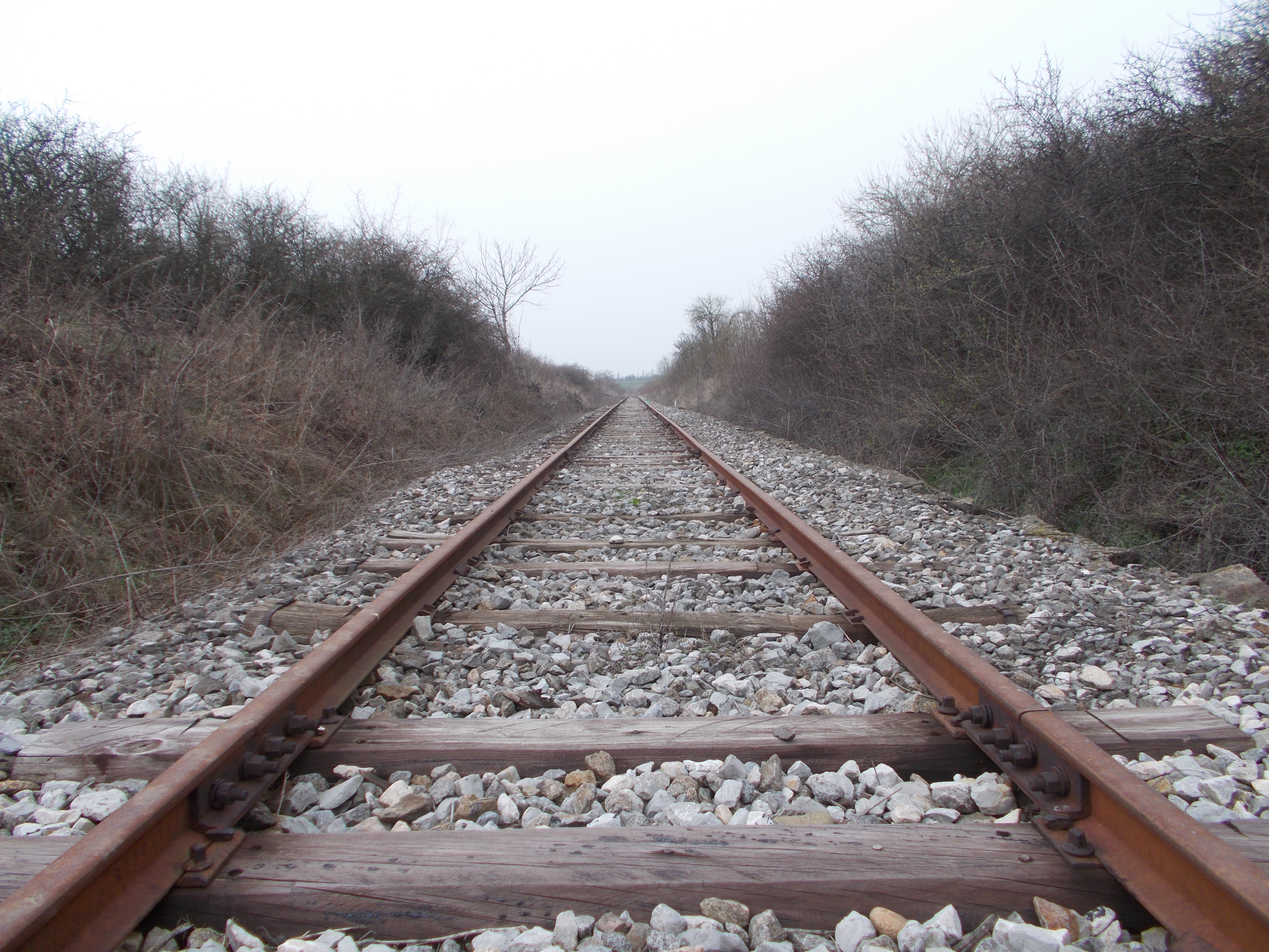 „Ротшилдова пруга“, деоница Бела Црква - Црвена Црква. На слици се може приметити привидно спајање шина дуж железничке пруге у једну тачку. Сличан привид се јавља код атмосферског феномена познат као крепускуларни зраци.